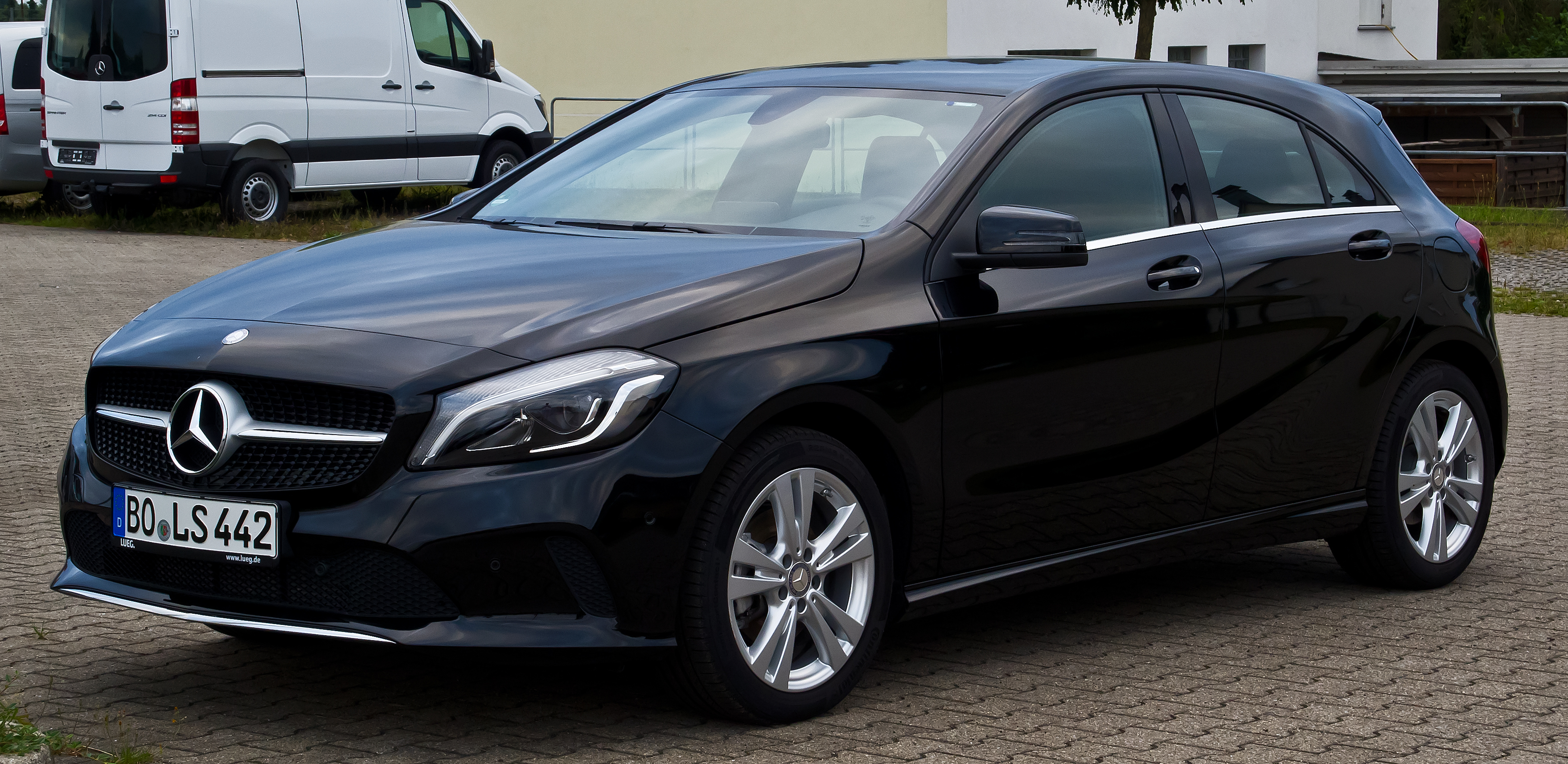 Mercedes-Benz A 180 Urban (W 176, Facelift)